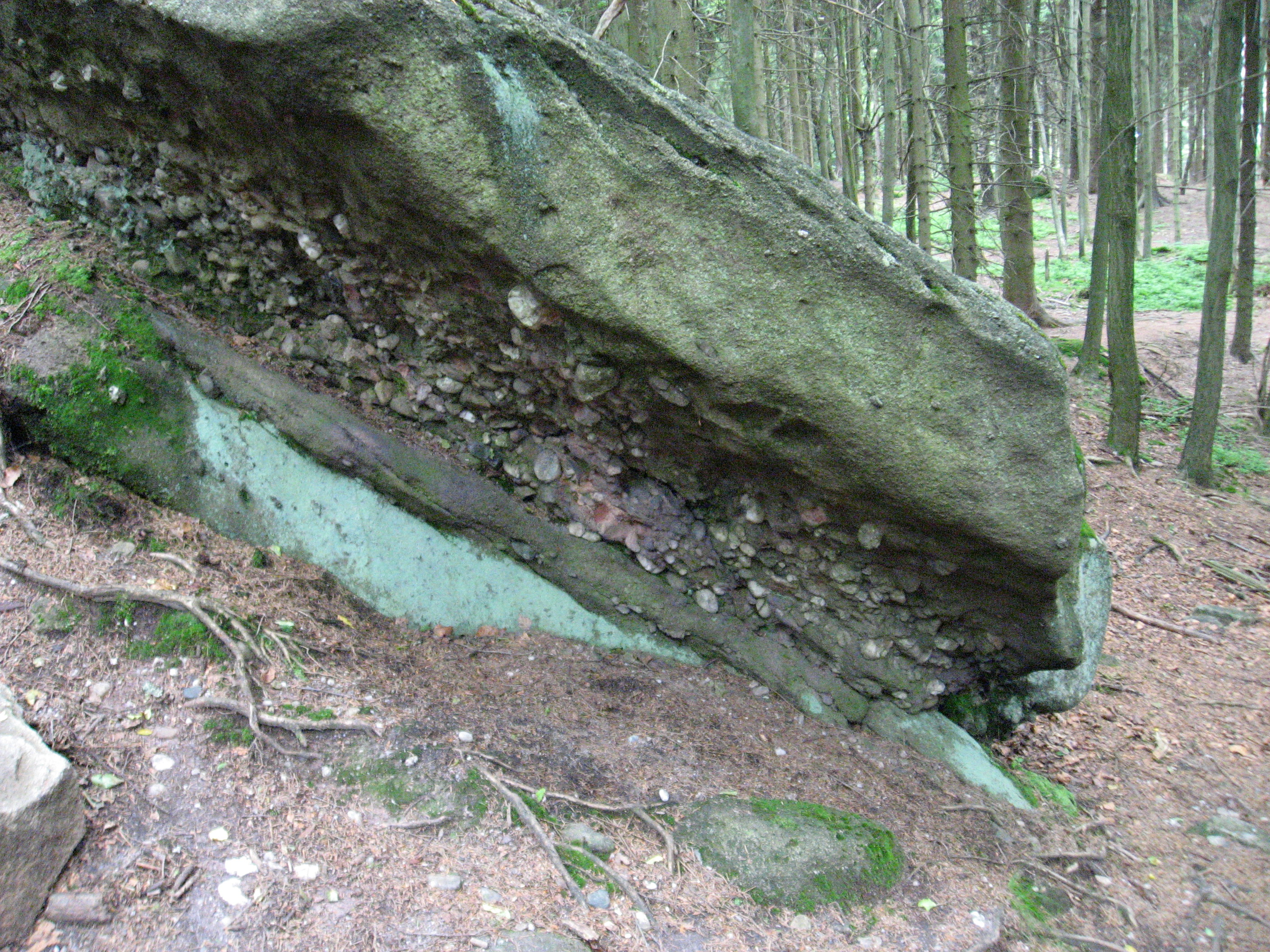 Kámen u Žaltmanu